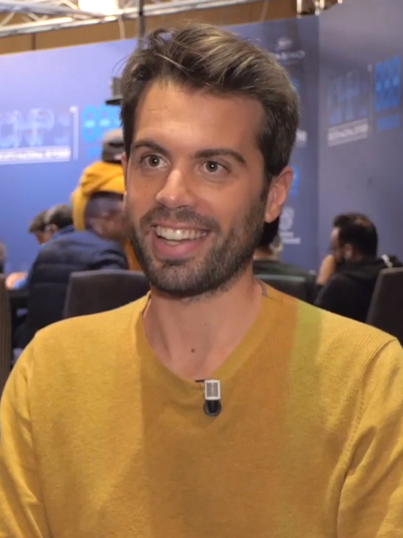 Ramon Colillas beim CNP888 Madrid